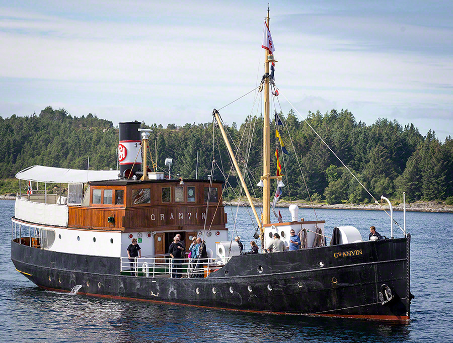 MS "Granvin" på vei inn i Florø havn under Fjordsteam 2015